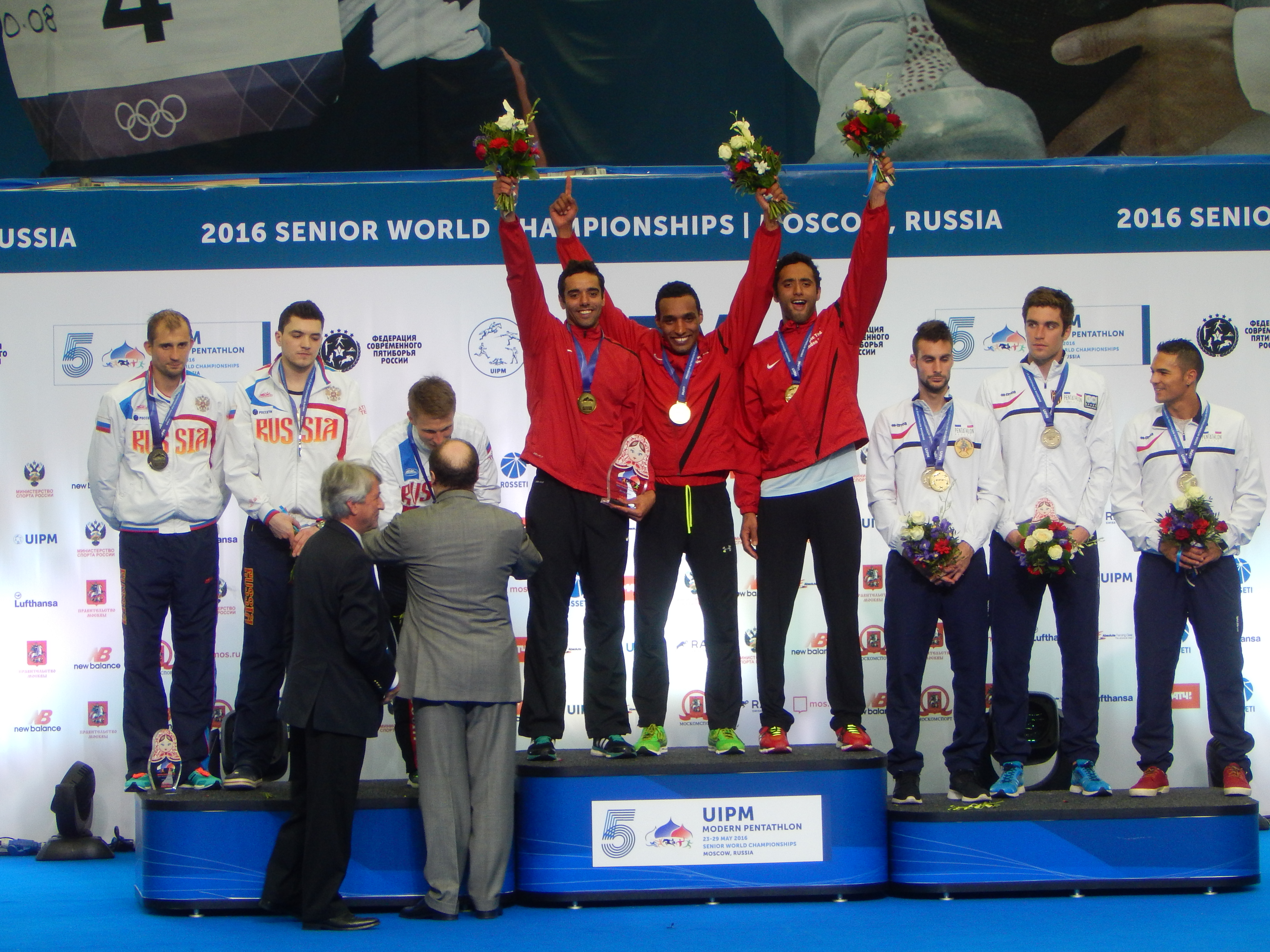 Чемпионат мира по современному пятиборью 2016. Церемония награждения в командных соревнованиях у мужчин